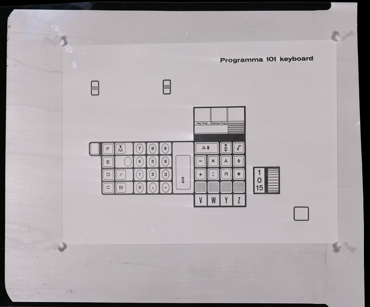 Servizio fotografico : Italia, 1968 / Paolo Monti. - Buste: 2, Fototipi: 2 : Negativo b/n, gelatina bromuro d'argento/ pellicola ; 10x12. - ((Serie costituita da 2 buste sciolte di negativi identificati con i nn.: 14322, 14323. - Occasione: Documentazione per pubblicità riproduzione grafica tastiera Calcolatore elettronico da tavolo P.101. - (1968/05/24). - Fonte: Agenda di Paolo Monti: Monti/ 3 aprile 1966 - 9 marzo 1971/ 12421-16823 (1966-1971), presso Archivio Paolo Monti. - Fonte: Fattura di Paolo Monti: IV. Commesse/ Fattura/ Programma P. 101